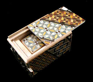 A Himitsu-bako or puzzle box from Japan